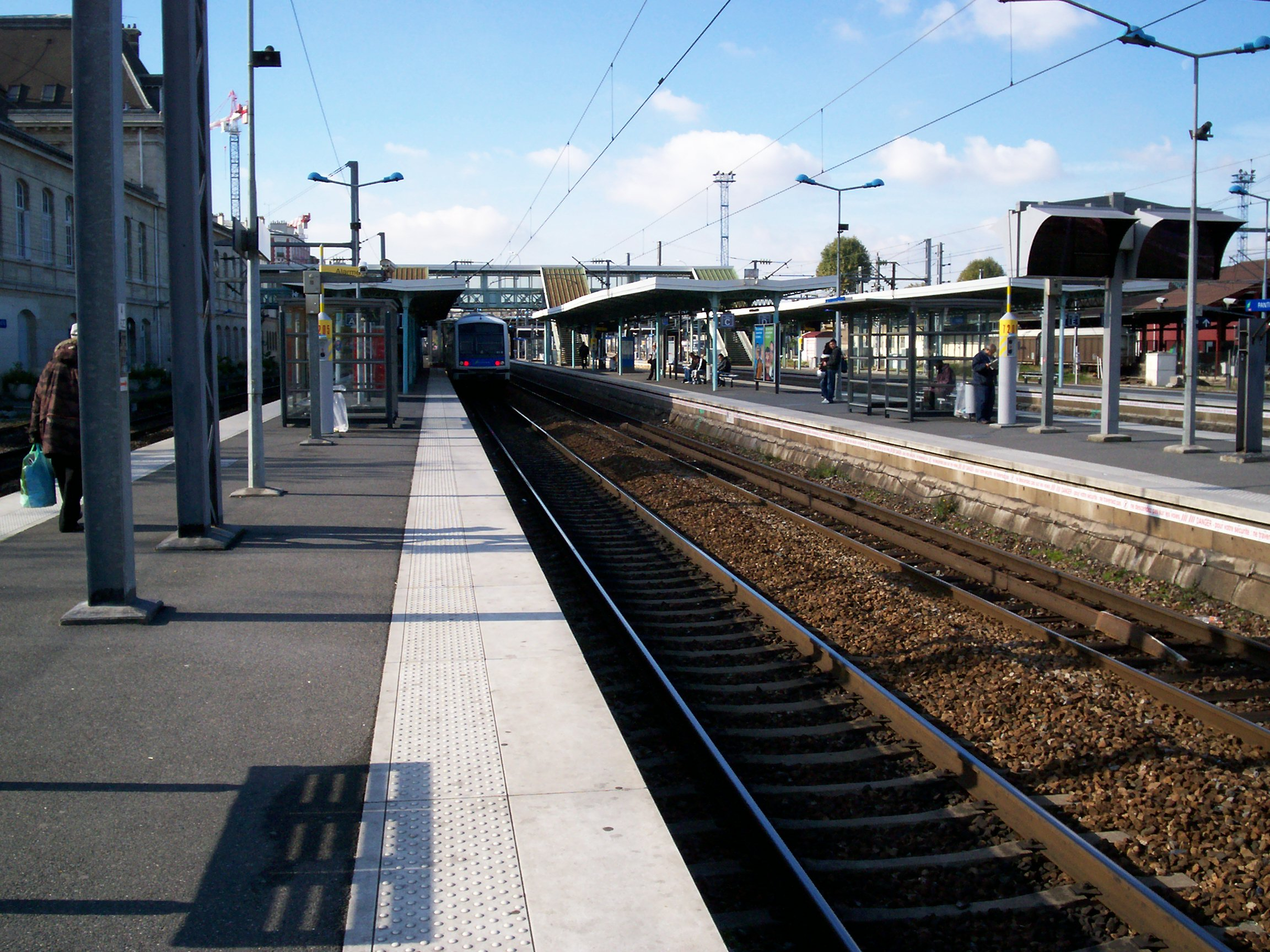 RER E - Gare de Pantin